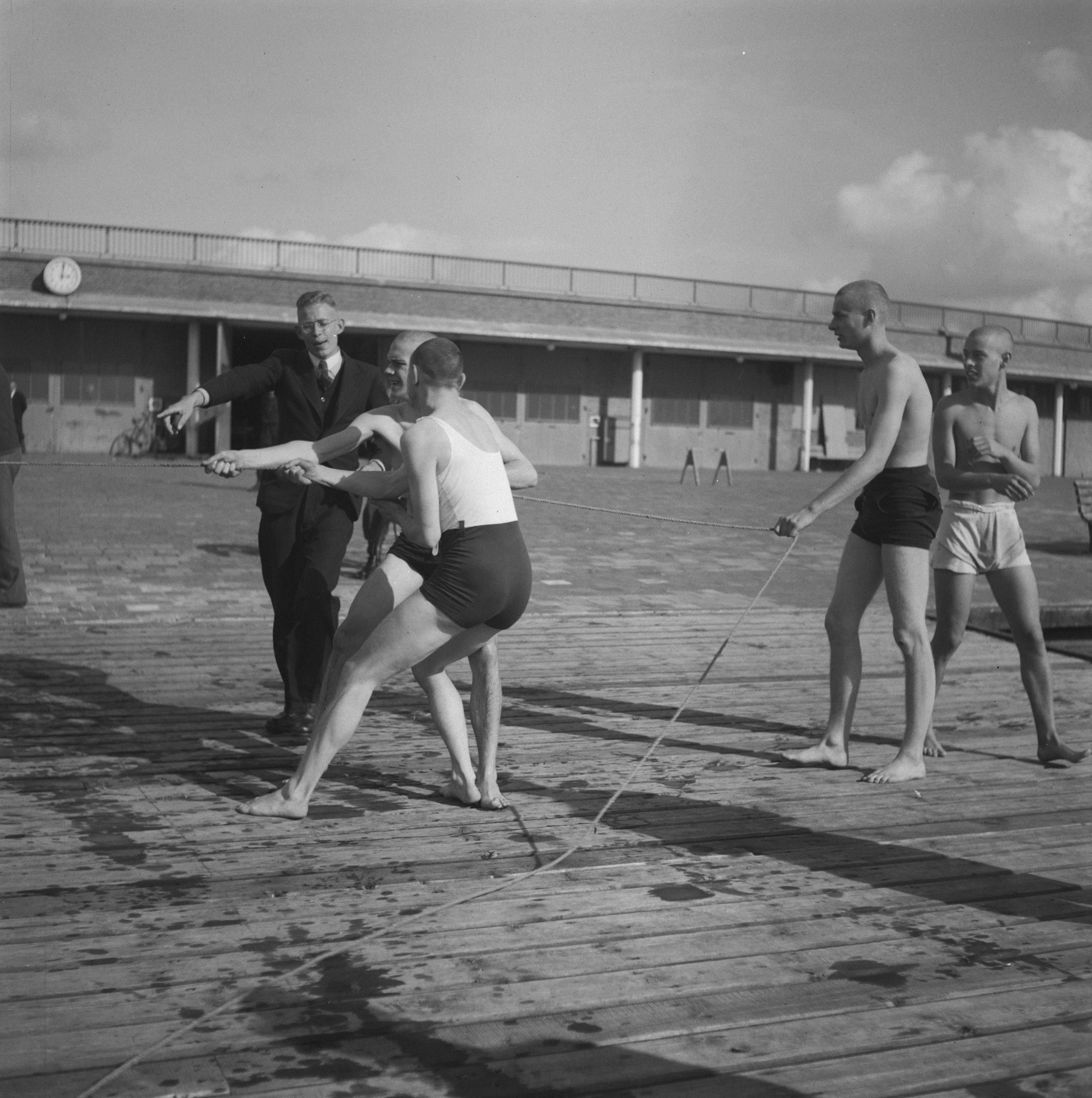 Collectie / Archief : Fotocollectie Anefo Reportage / Serie : [ onbekend ] Beschrijving : Ontgroening Studenten Datum : 23 september 1946 Trefwoorden : ONTGROENING, STUDENTEN Fotograaf : Wisman, Bram / Anefo Auteursrechthebbende : Nationaal Archief Materiaalsoort : Negatief (zwart/wit) Nummer archiefinventaris : bekijk toegang 2.24.01.03 Bestanddeelnummer : 901-9259